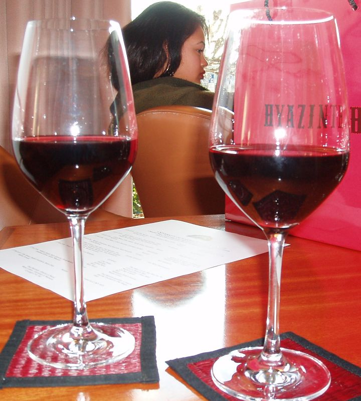 Vin rouge du canton de Vaud